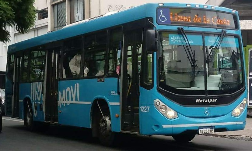 Mercedes-Benz de la empresa Movi, encargada de prestar el servicio de la Línea de la costa